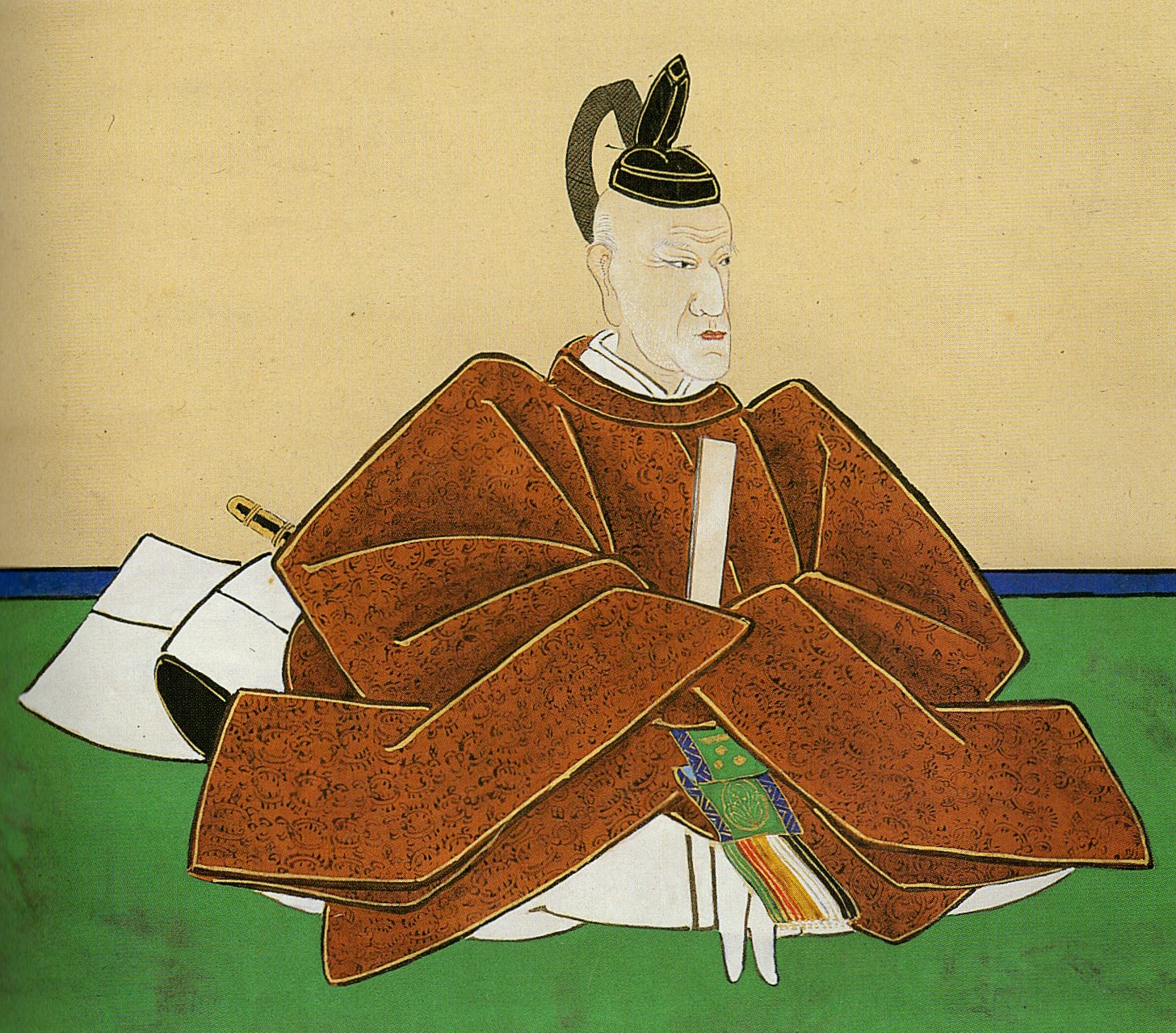 徳山藩八代藩主・毛利広鎮の肖像画。